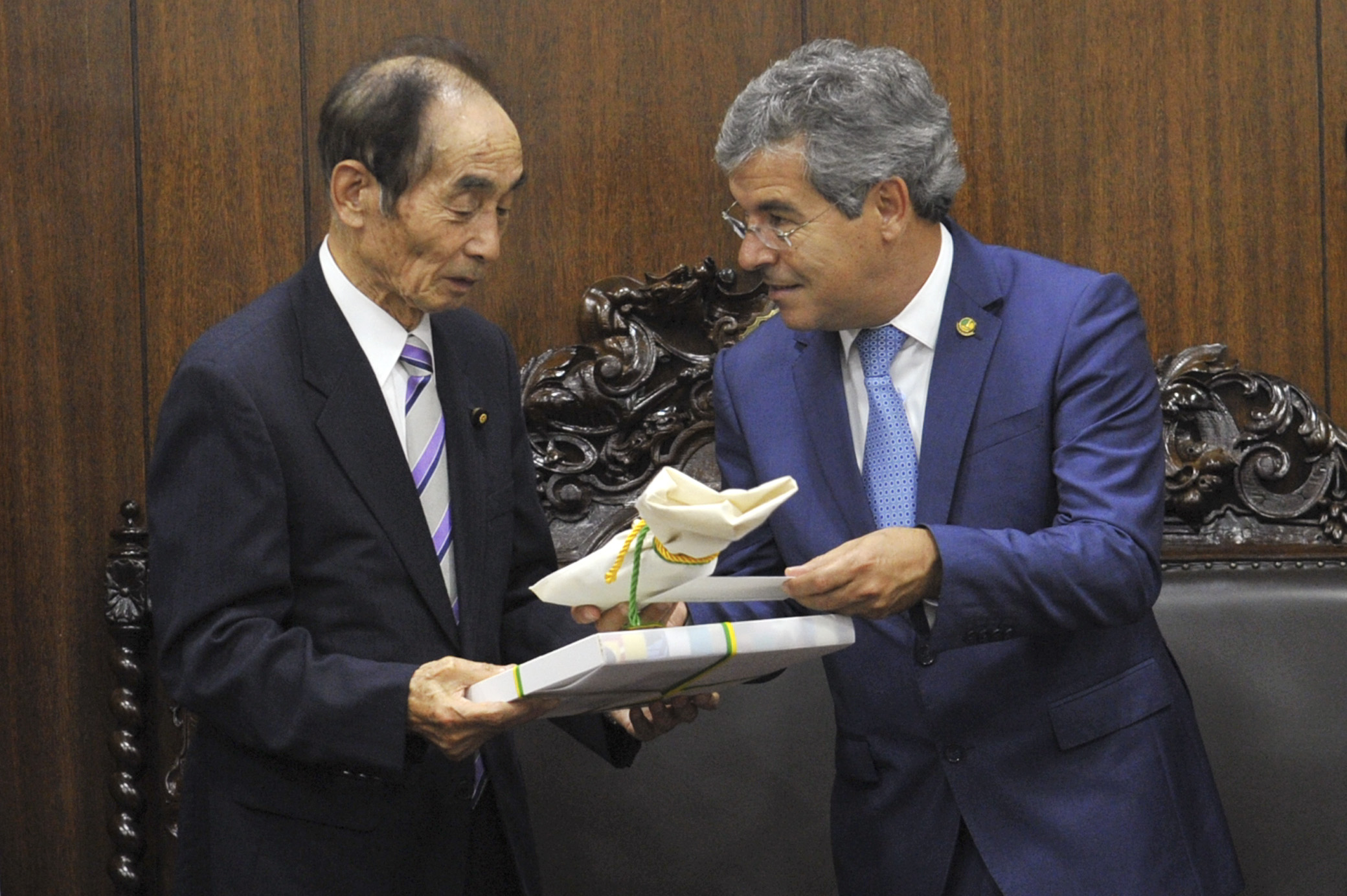 Presidente do Senado Federal, senador Renan Calheiros (PMDB-AL) recebe delegação da comitiva de parlamentares do Japão que fazem visita ao Senado Federal, com a presença do Vice-Presidente da House of Councillors da Dieta do Japão, senador Azuma Koshiishi e do embaixador do Japão no Brasil, Kunio Umeda. Foto: Jane de Araújo/Agência Senado